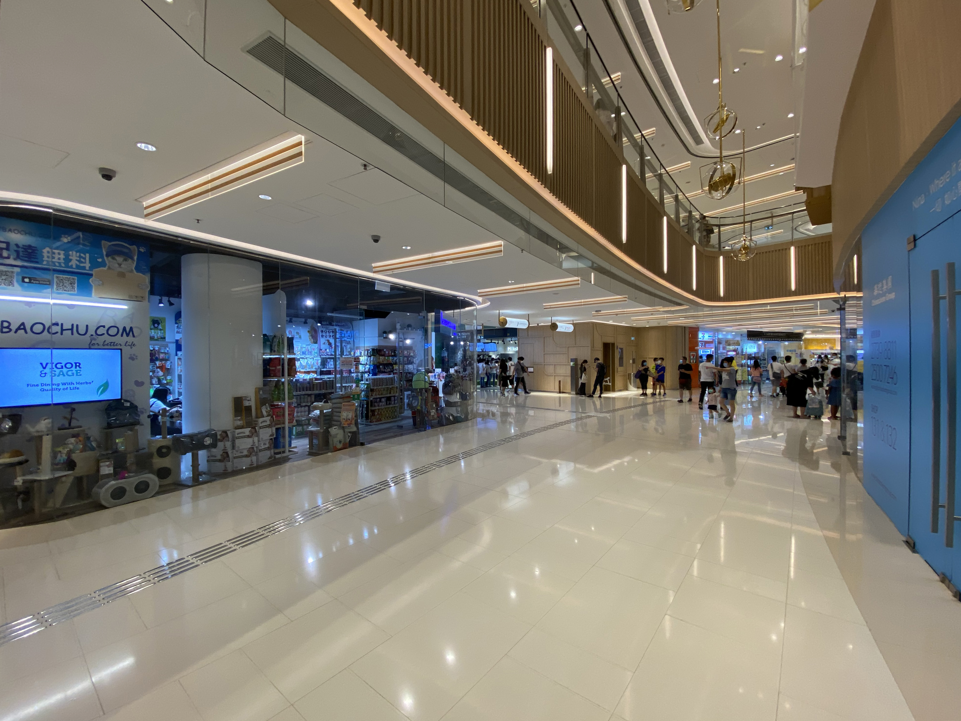 Nina Mall II Level 1